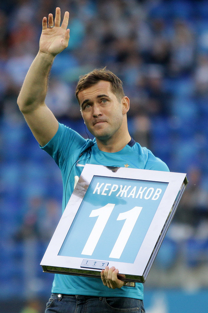 «Зенит» - «Спартак»